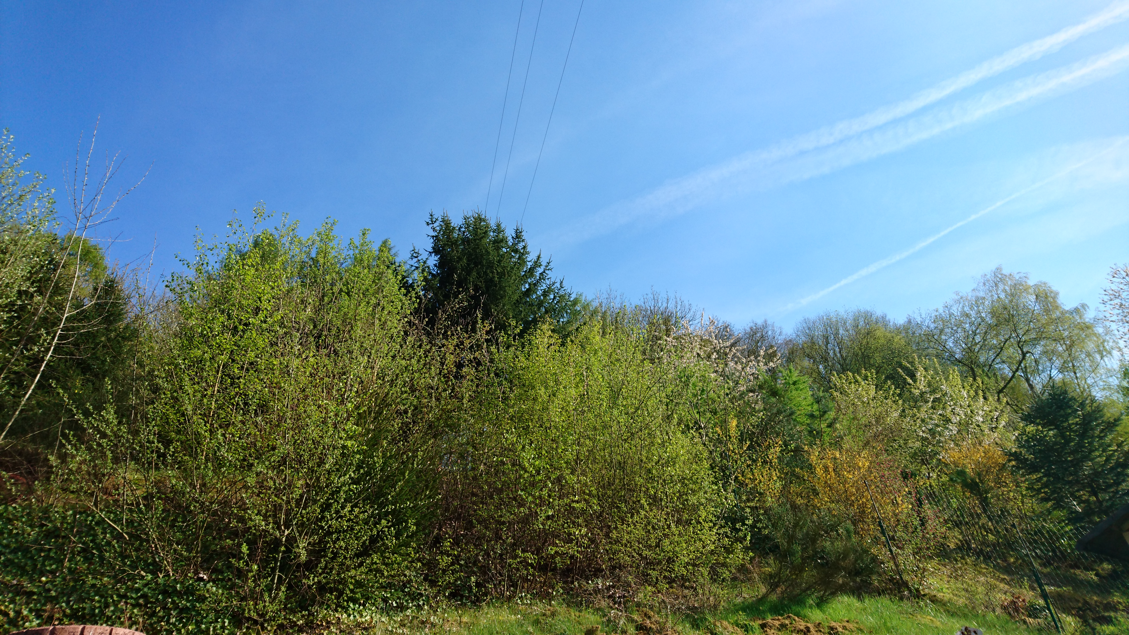 Zu sehen sind einige Baumkronen eines Waldes in der Pfalz.